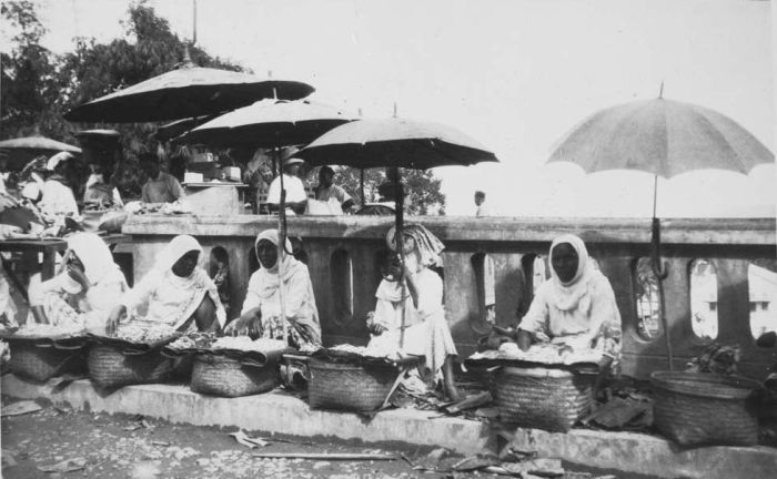 Foto. Marktvrouwen met hun koopwaar, Fort de Kock, Sumatra`s Westkust